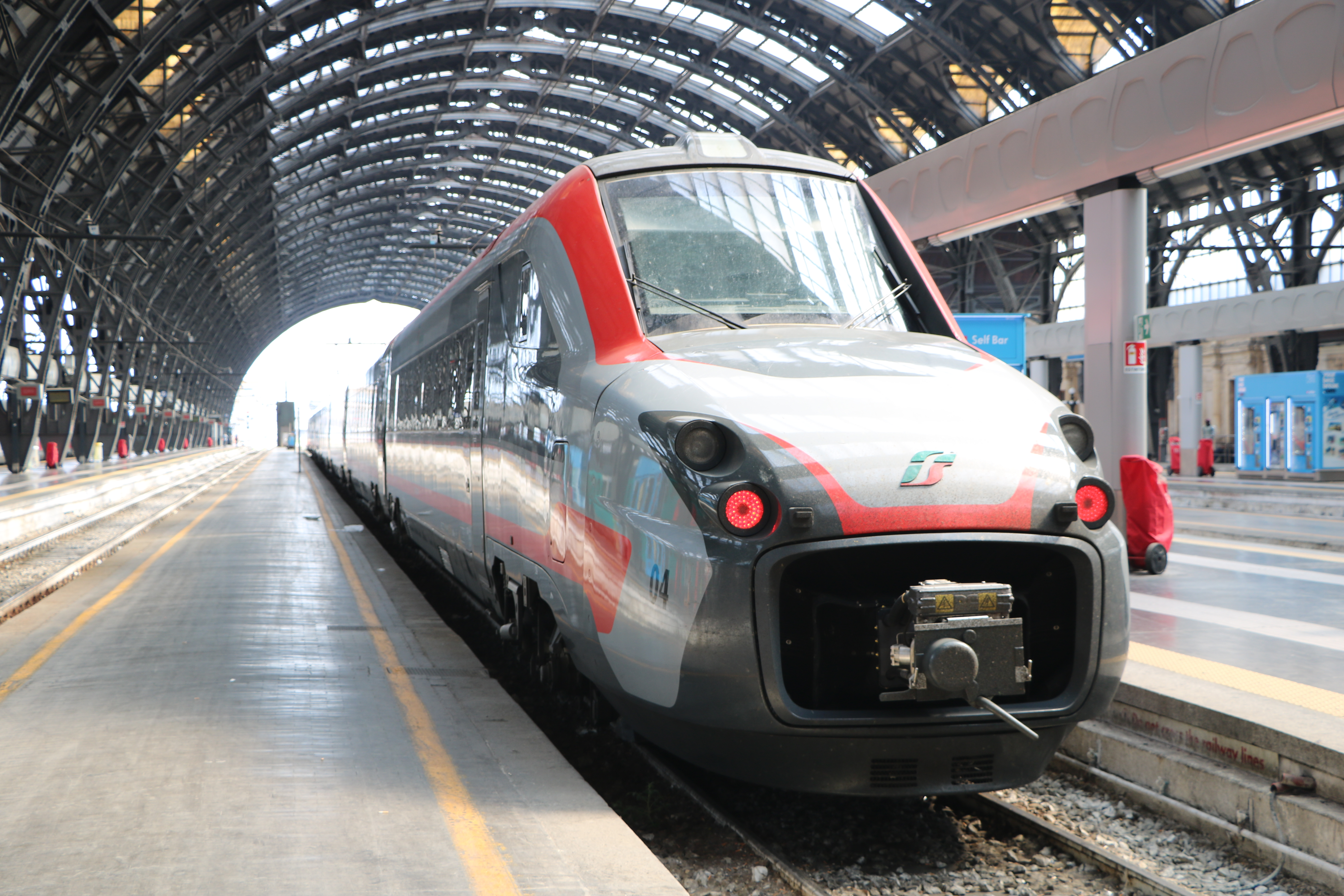 ETR 700 004 in Milano Centrale (ehemals Fyra V250)